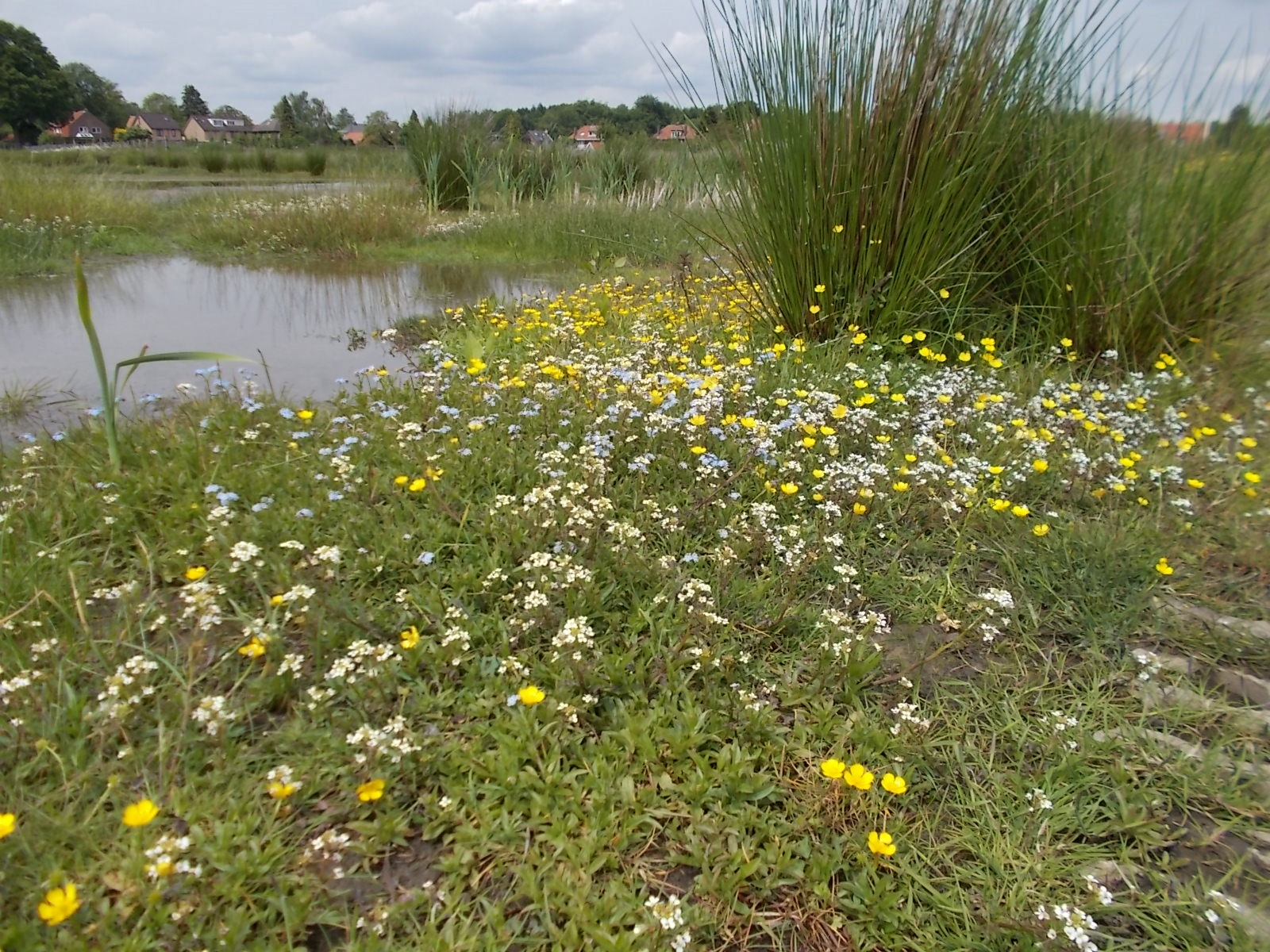 Plas/drasgebied in zeven jaar eerder aangelegd retentiegebied in het Zandweteringpark bij de Zandwetering te Deventer. Begin juni 2015